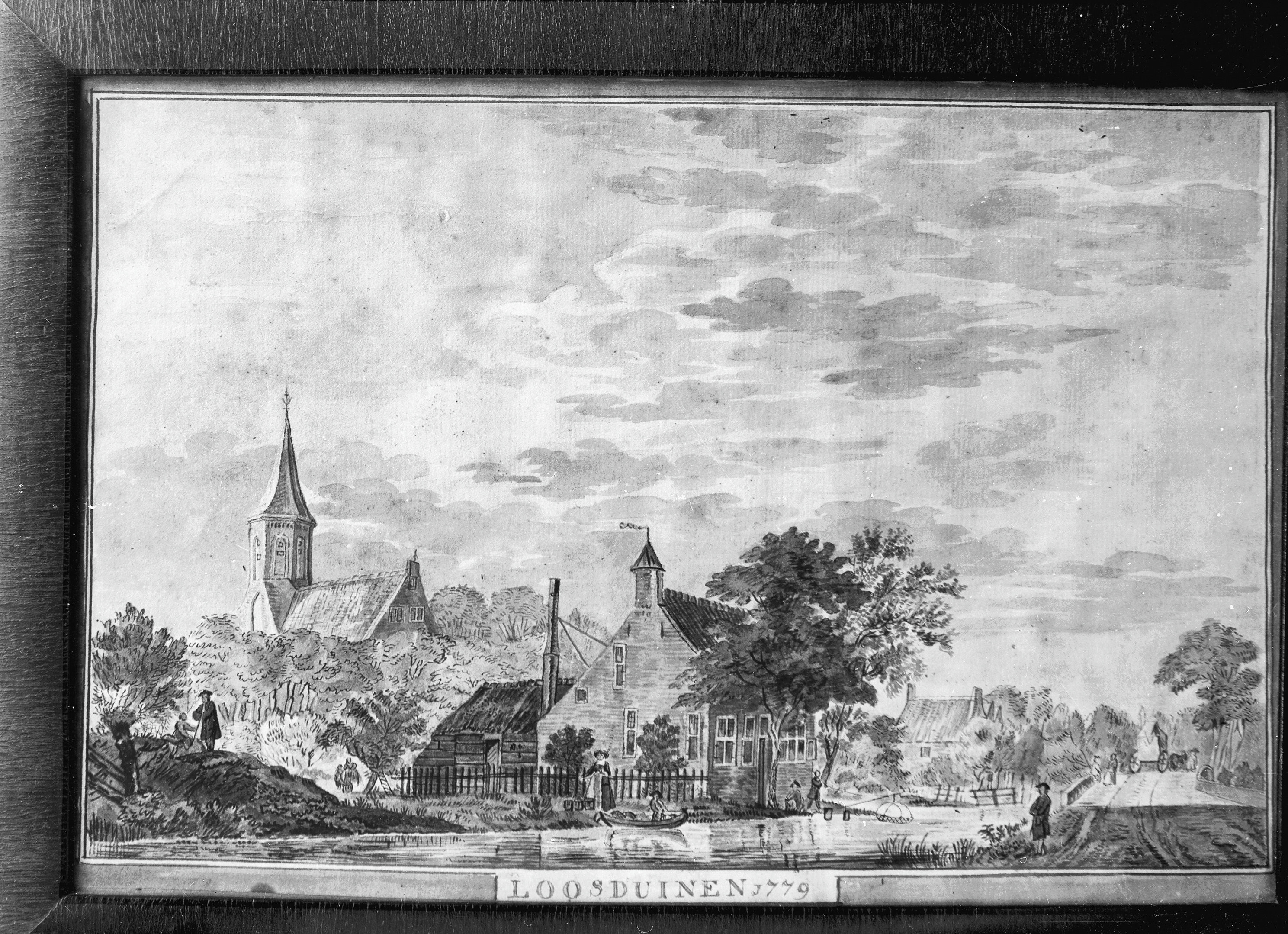 Pl.gronden en Overzichten: Dorpsgezicht